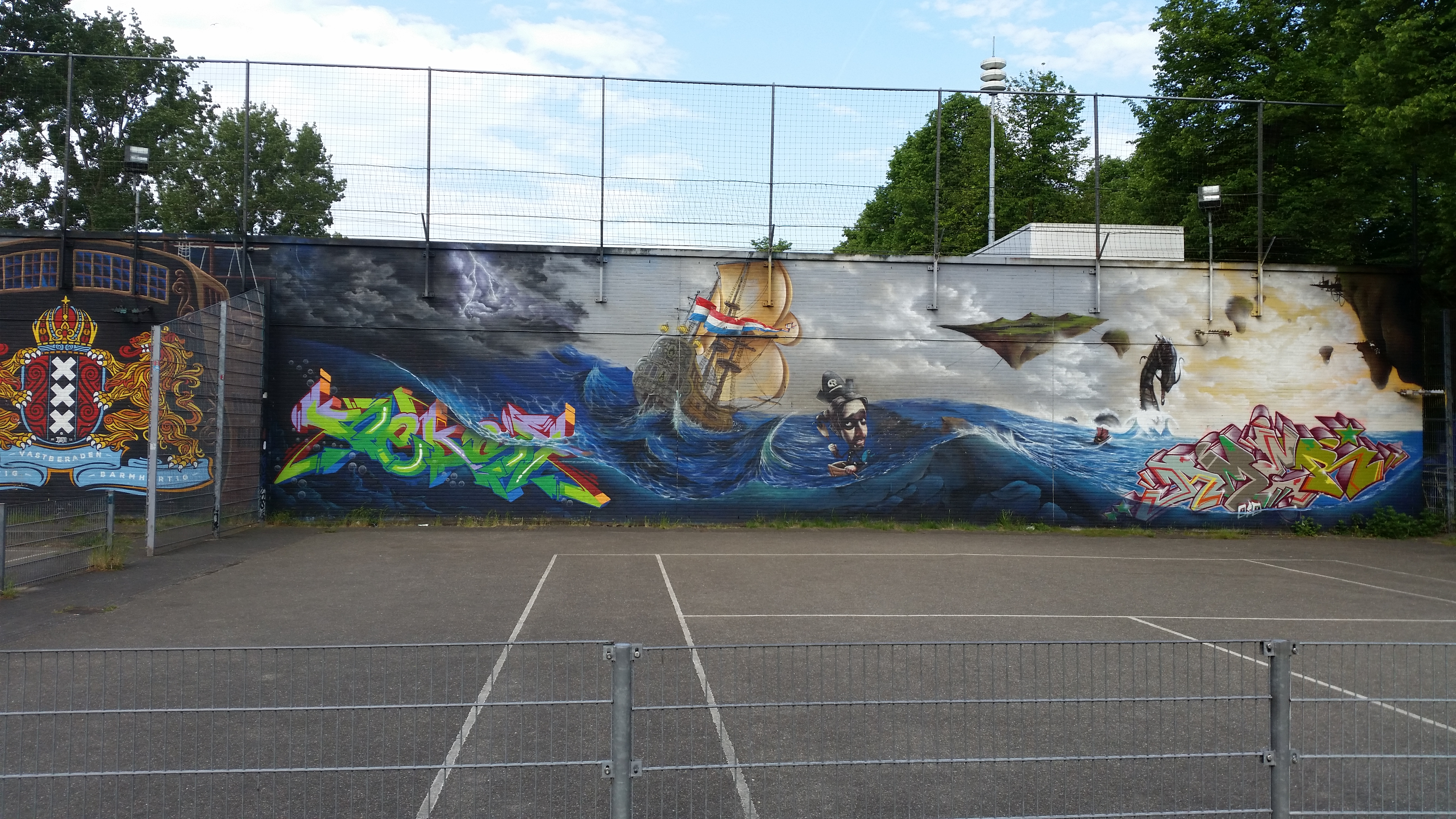 Signs of Mokum, rechterdeel